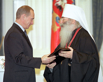 МОСКВА, КРЕМЛЬ. Церемония вручения государственных наград священнослужителям Русской православной церкви и других христианских конфессий. Владимир Путин выразил особую благодарность митрополиту Санкт-Петербуржскому и Ладожскому Владимиру.